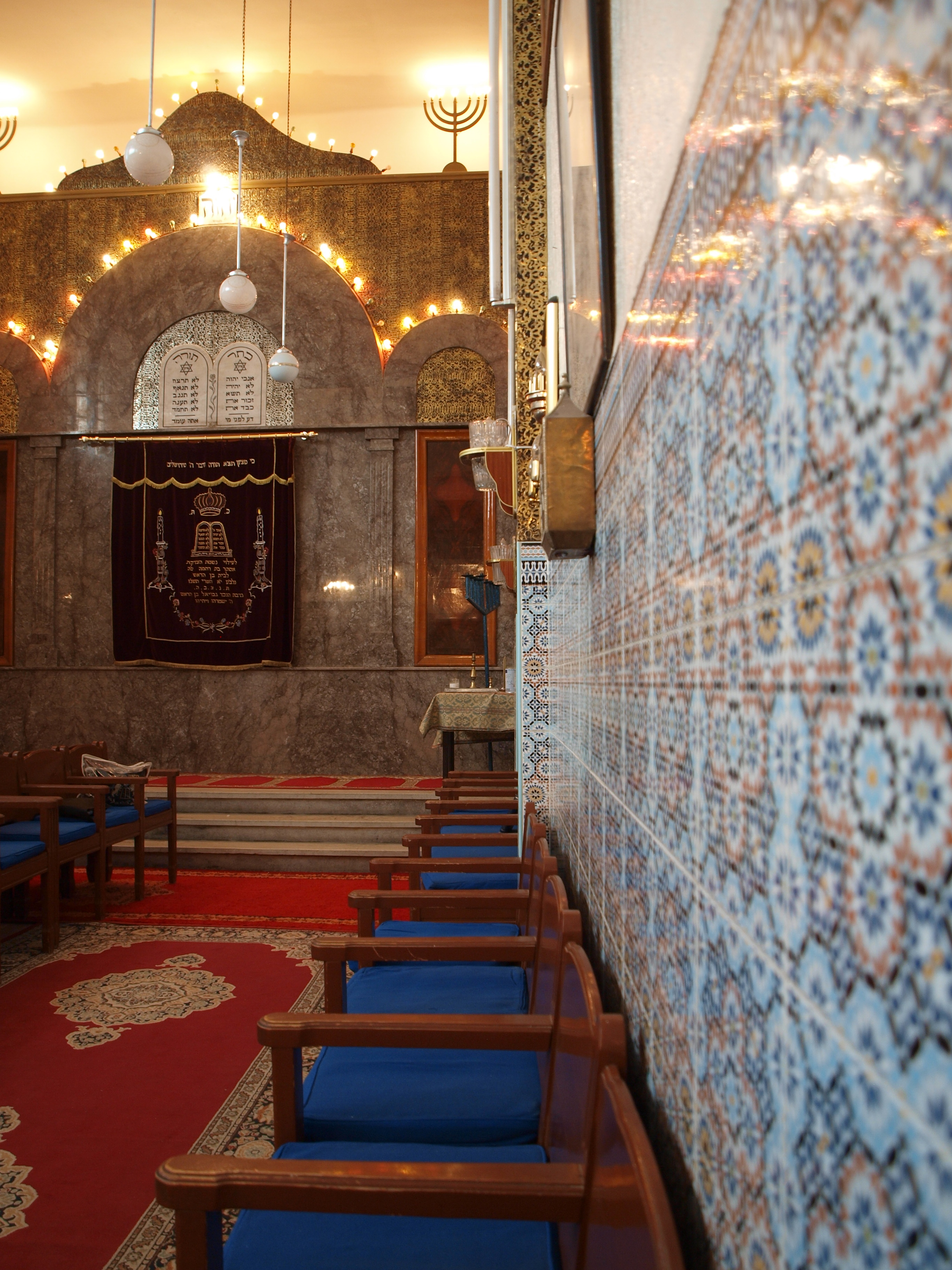 Mellah in Marrakech